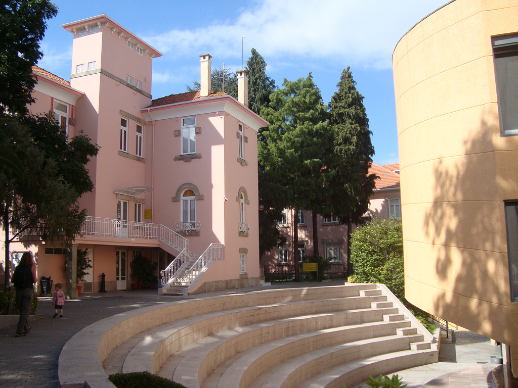 Porto / Portugal September 2010. Universidade Fernando Pessoa, Porto